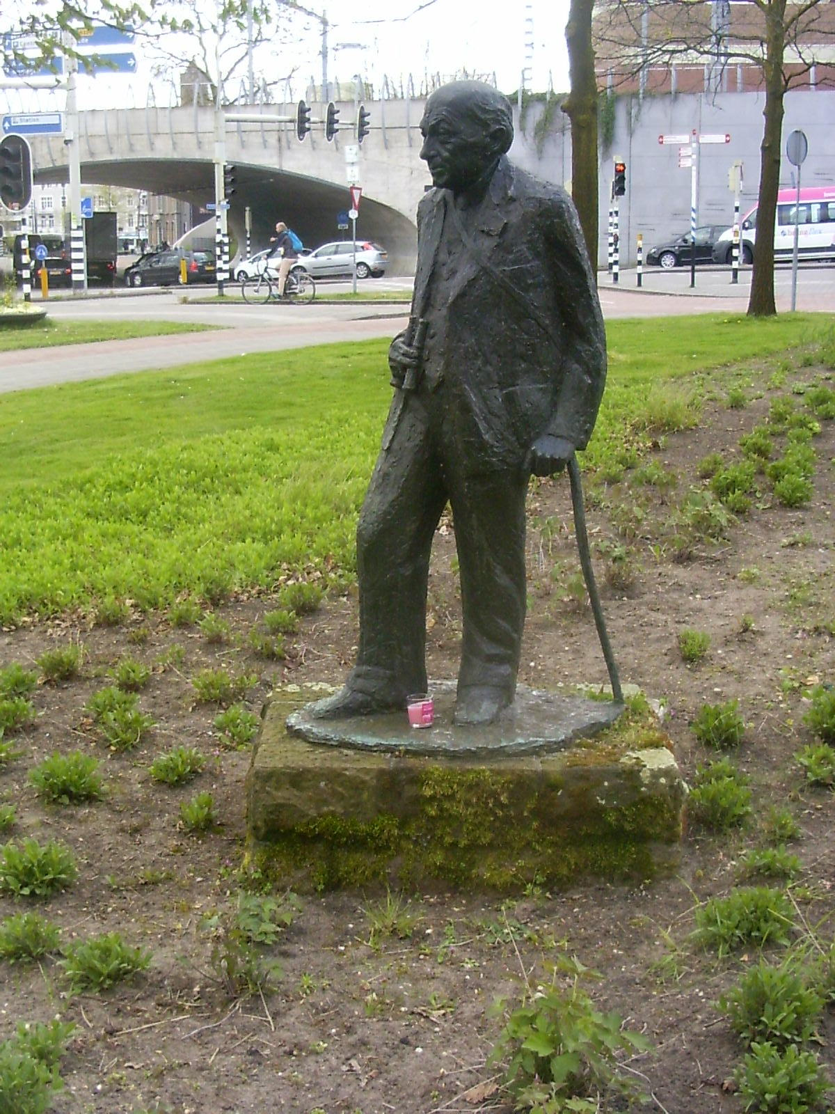 Arnhem, Zijpendaalseweg, beeld van Pieter Gerbrand van Tienhoven